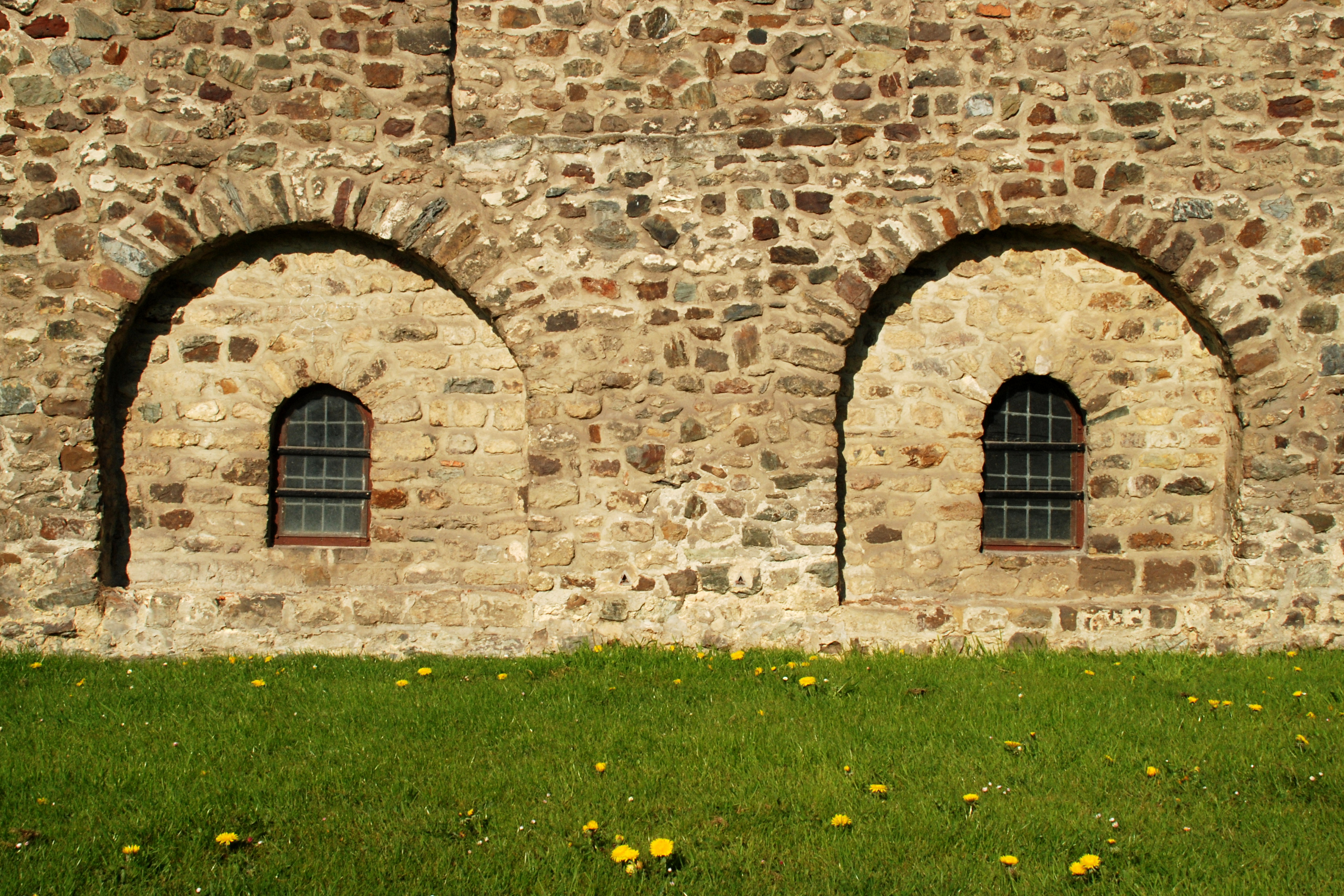 Belgique - Brabant wallon - Église Notre-Dame de Mousty